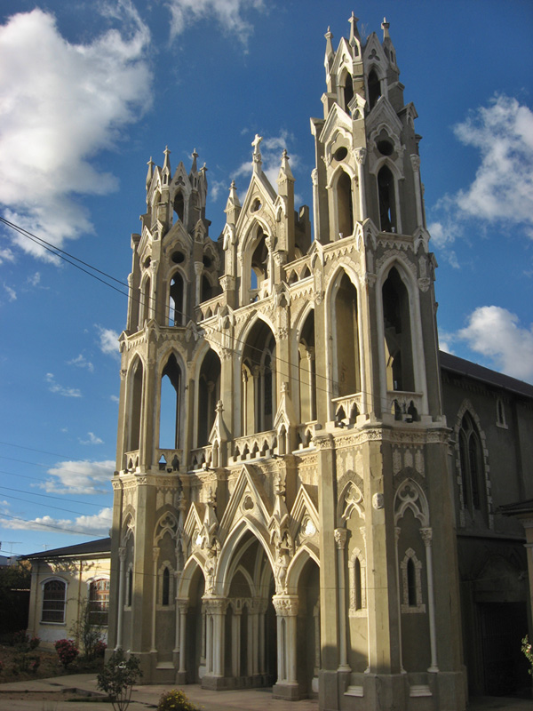 Capilla de Cristo Pobre, Provincia de Jauja, región Junín, Perú